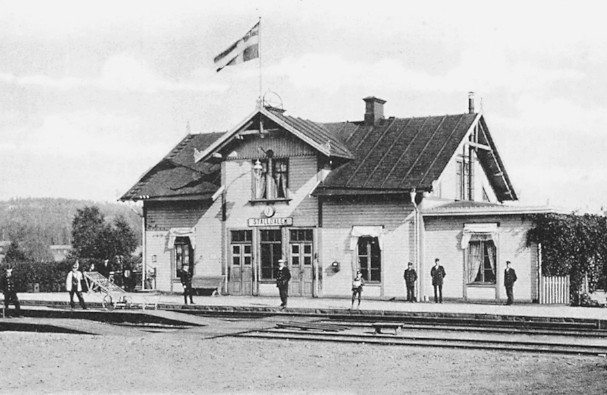 Ställdalen station på Frövi - Ludvika Järnväg (FLJ). Stationen anlades 1873.